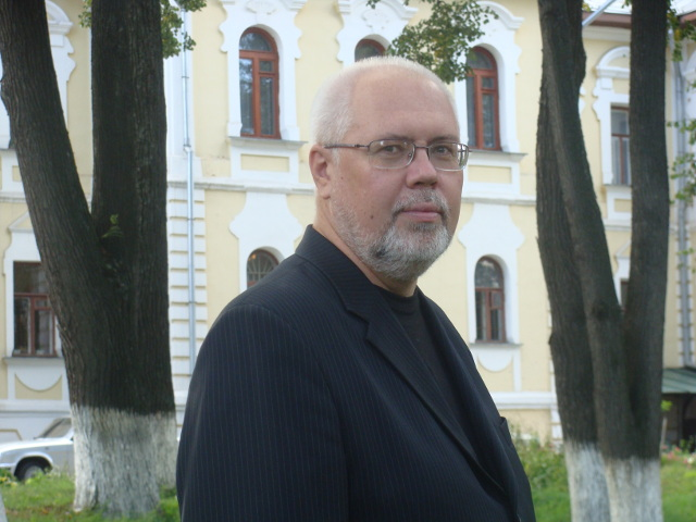 Кантов Дмитрий Владимирович